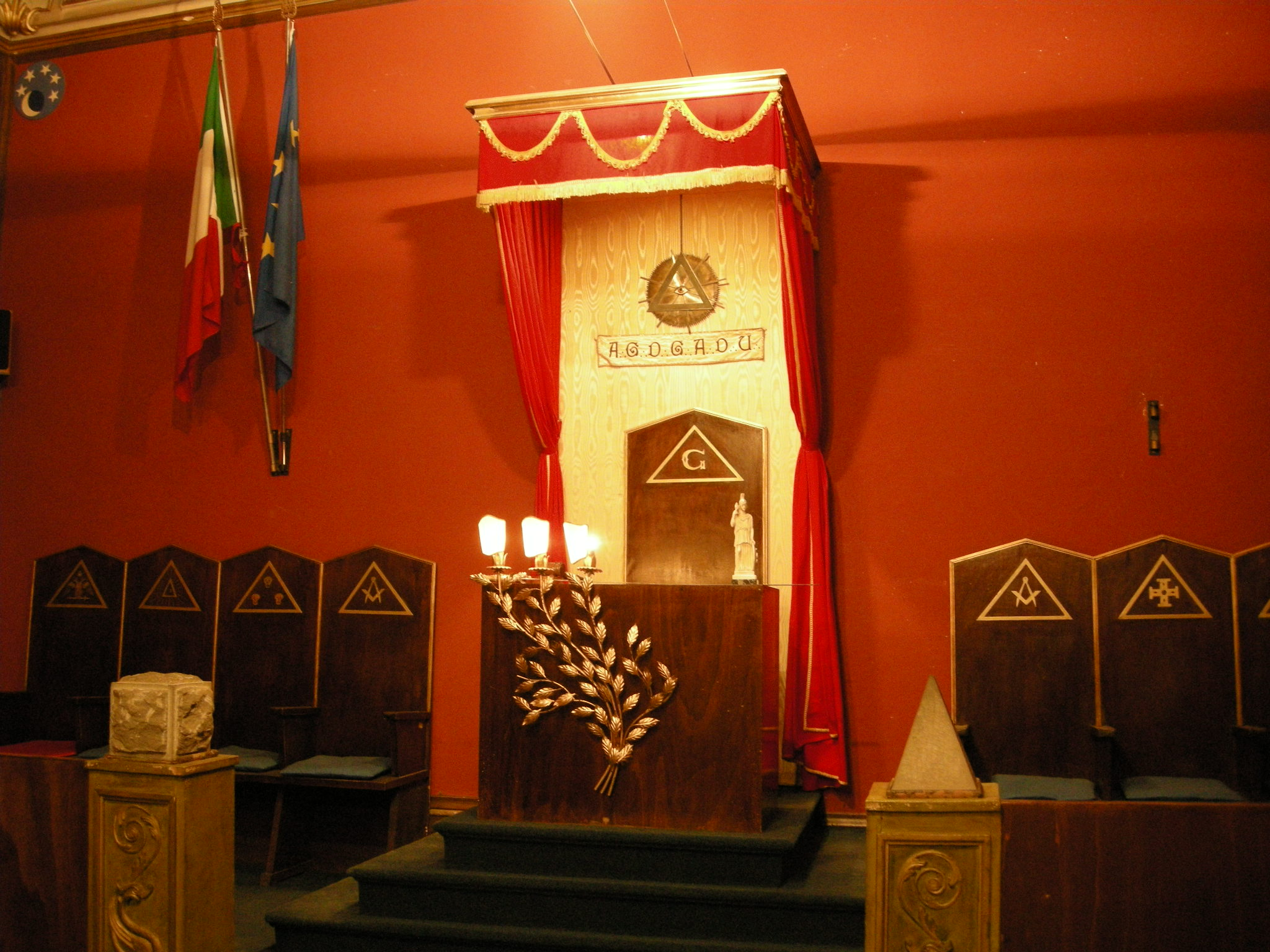 Sala dell'Apoteosi, tempio